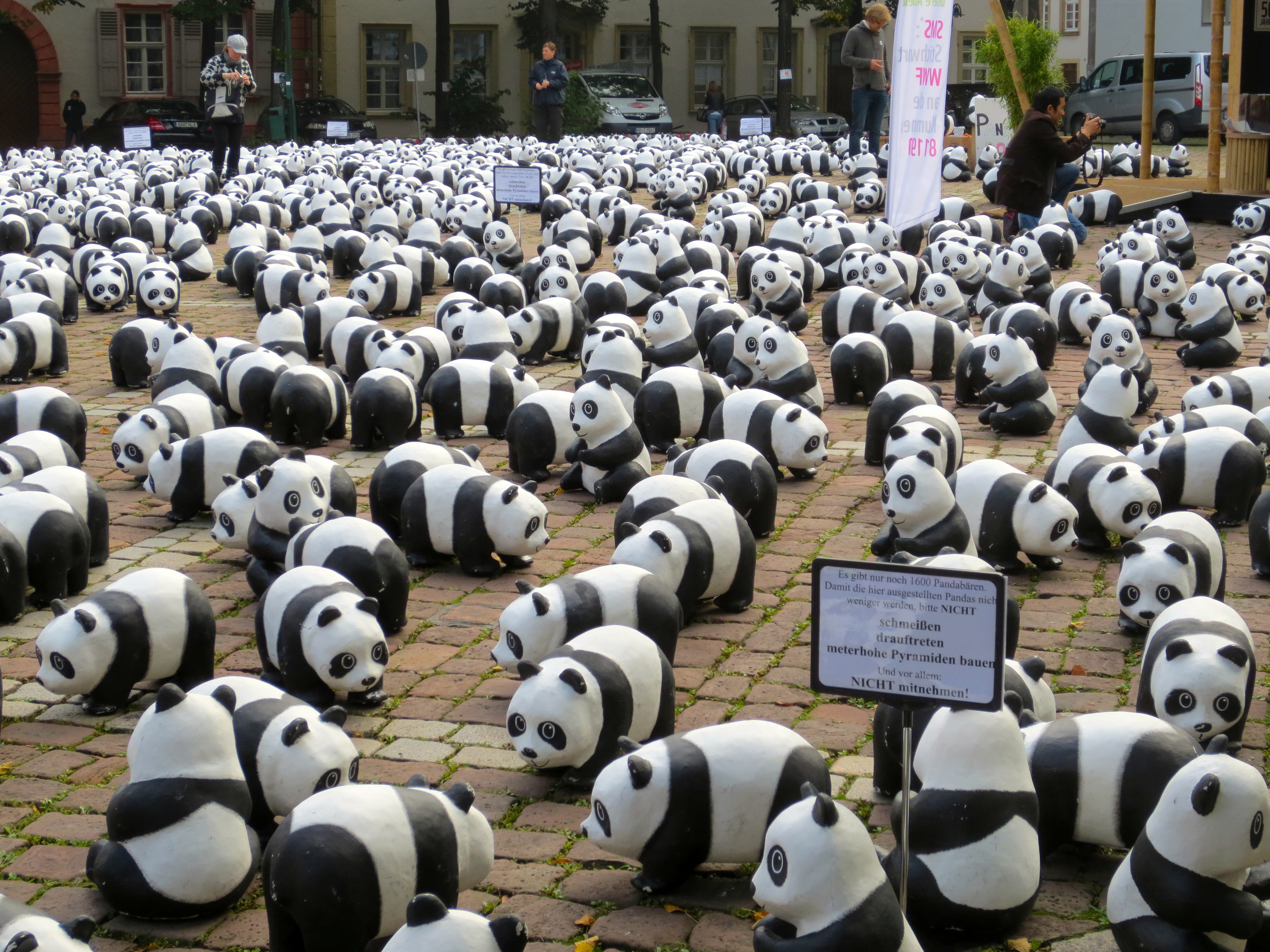 3. Aufnahme Universitätsplatz Heidelberg, es gibt nur noch 1600 Pandabären auf der Erde, hier wurden von der Naturschutzorganisation WWF 1600 Pandabären aus Papiermasche gebastelt und bemalt auf dem Universitätsplatz zur Veranschaulichung der prekären Überlebenschancen dieser Säugetiere aufgestellt